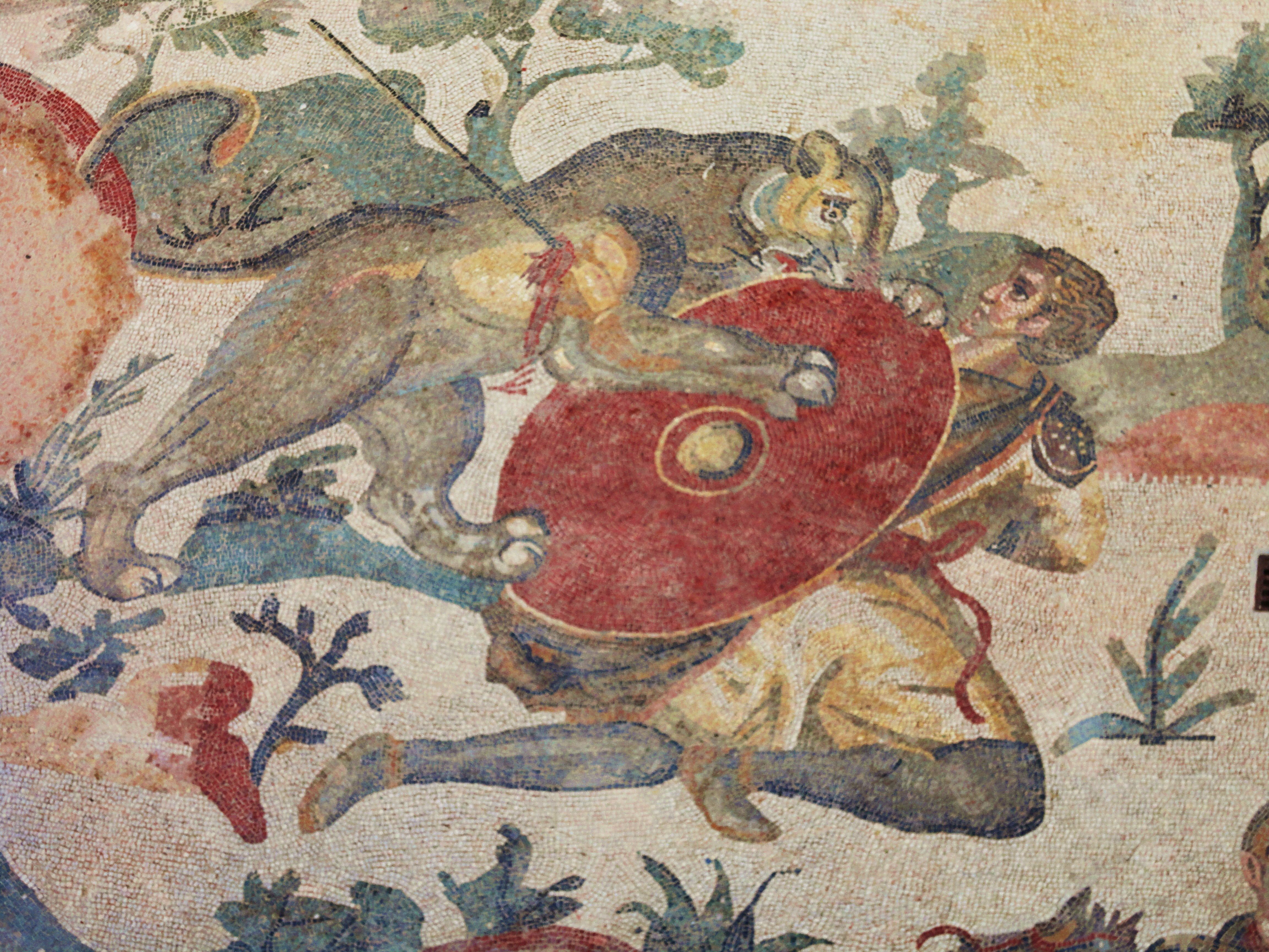 Mosaici della Villa del Casale - Piazza Armerina - Sicilia - lotta con belve